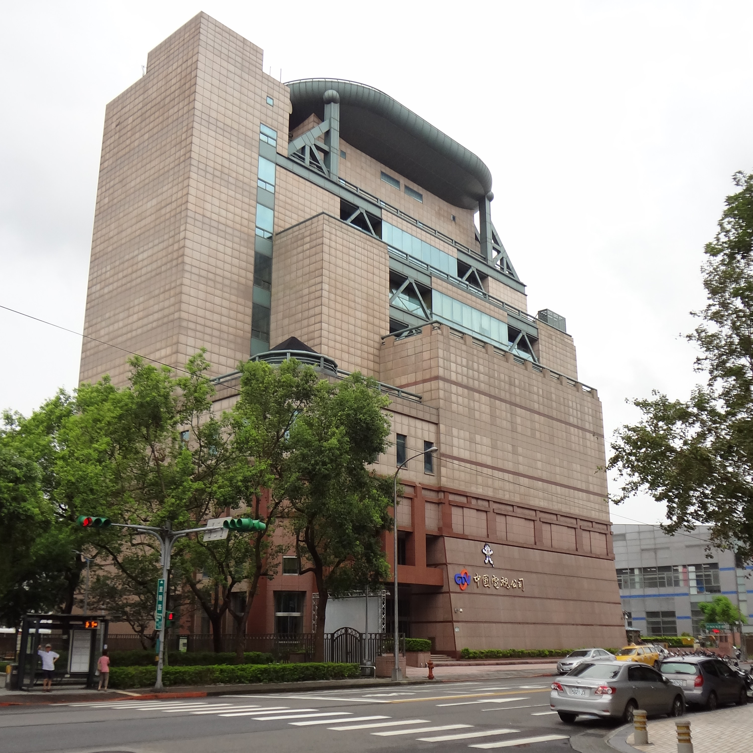 中國電視公司第二大樓左前方外觀。